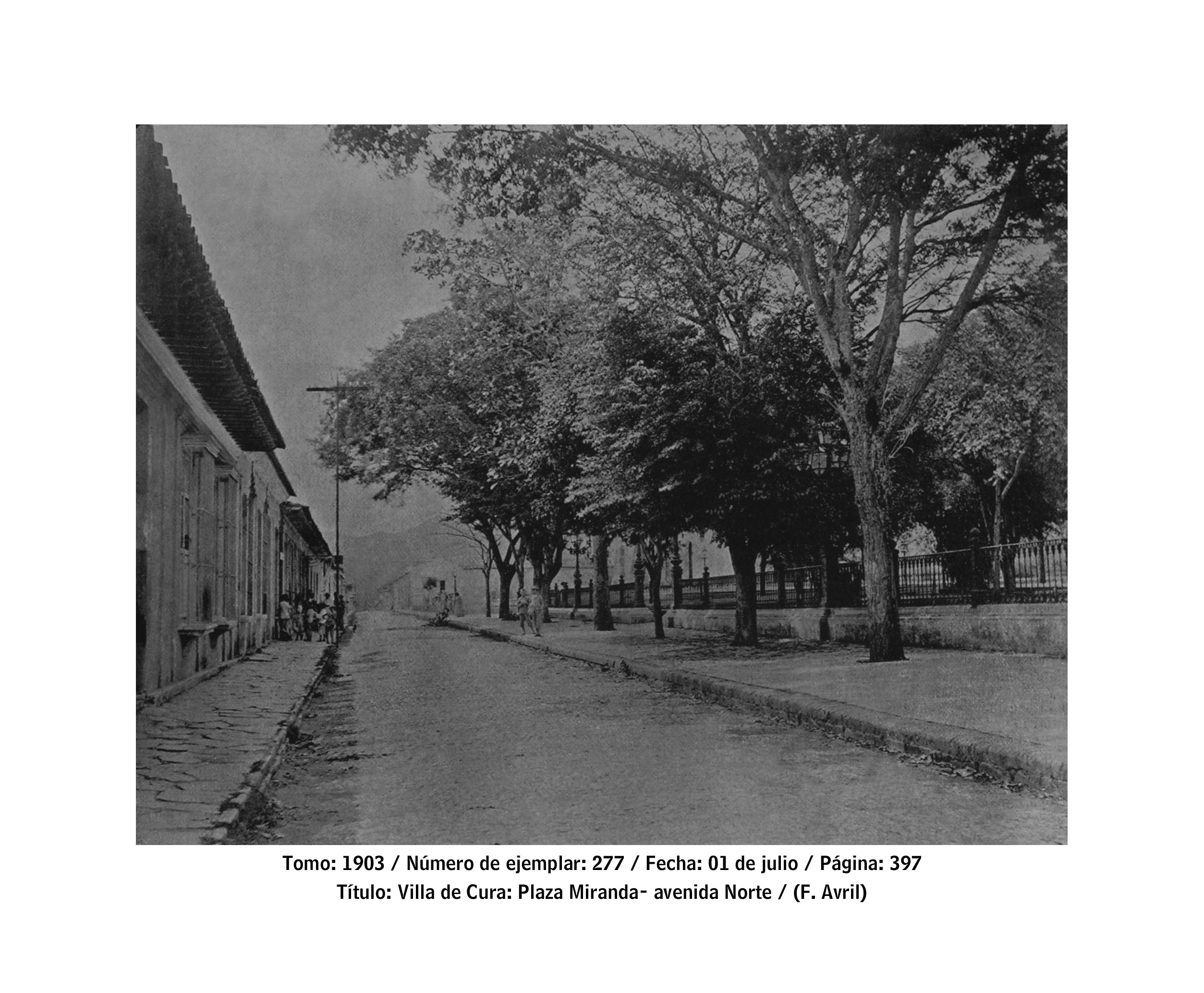 Foto de Henrique Avril